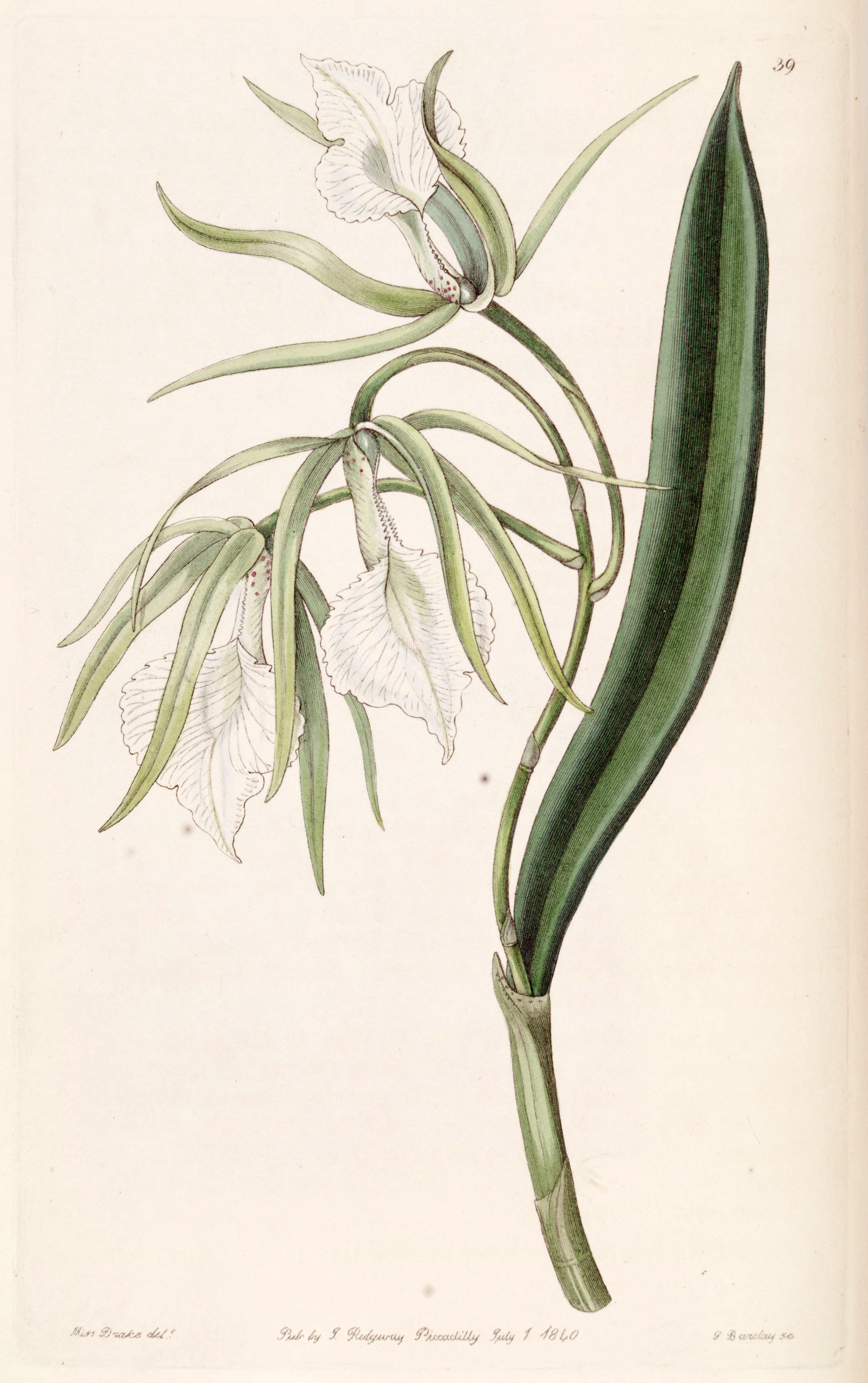 Brassavola venosa